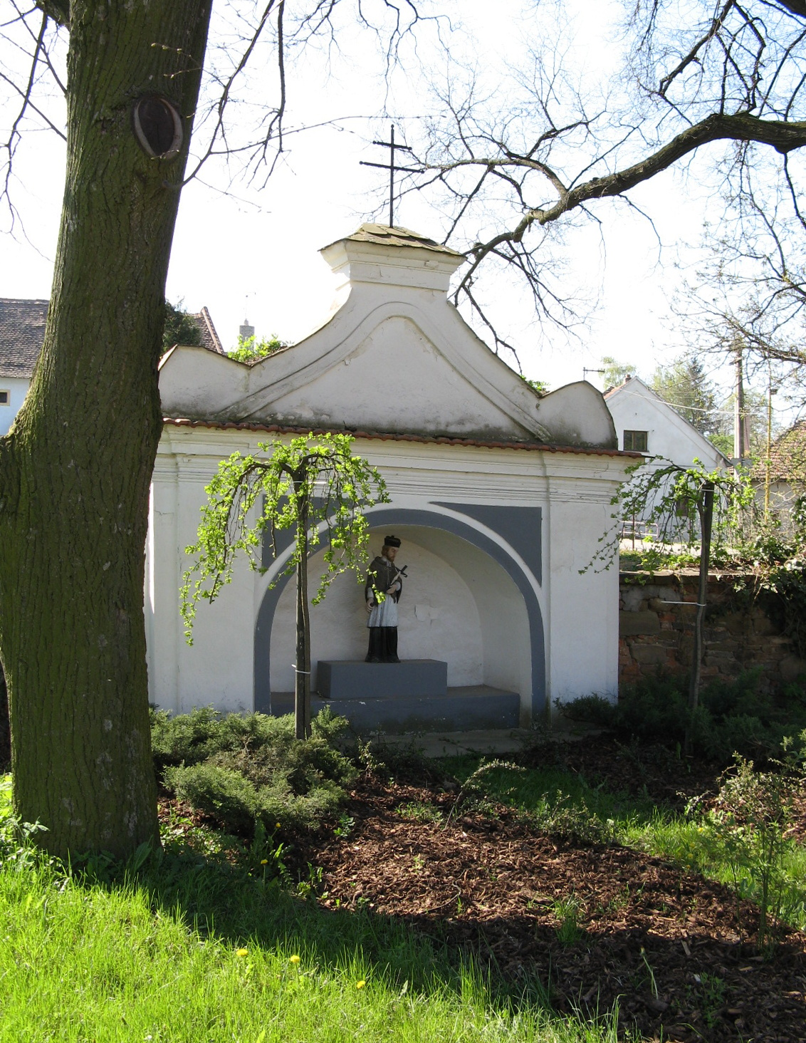 Výklenková kaplička sv. Jana Nepomuckého (Želeč), v ohradní zdi zahrady, u silnice do Doloplaz, Želeč